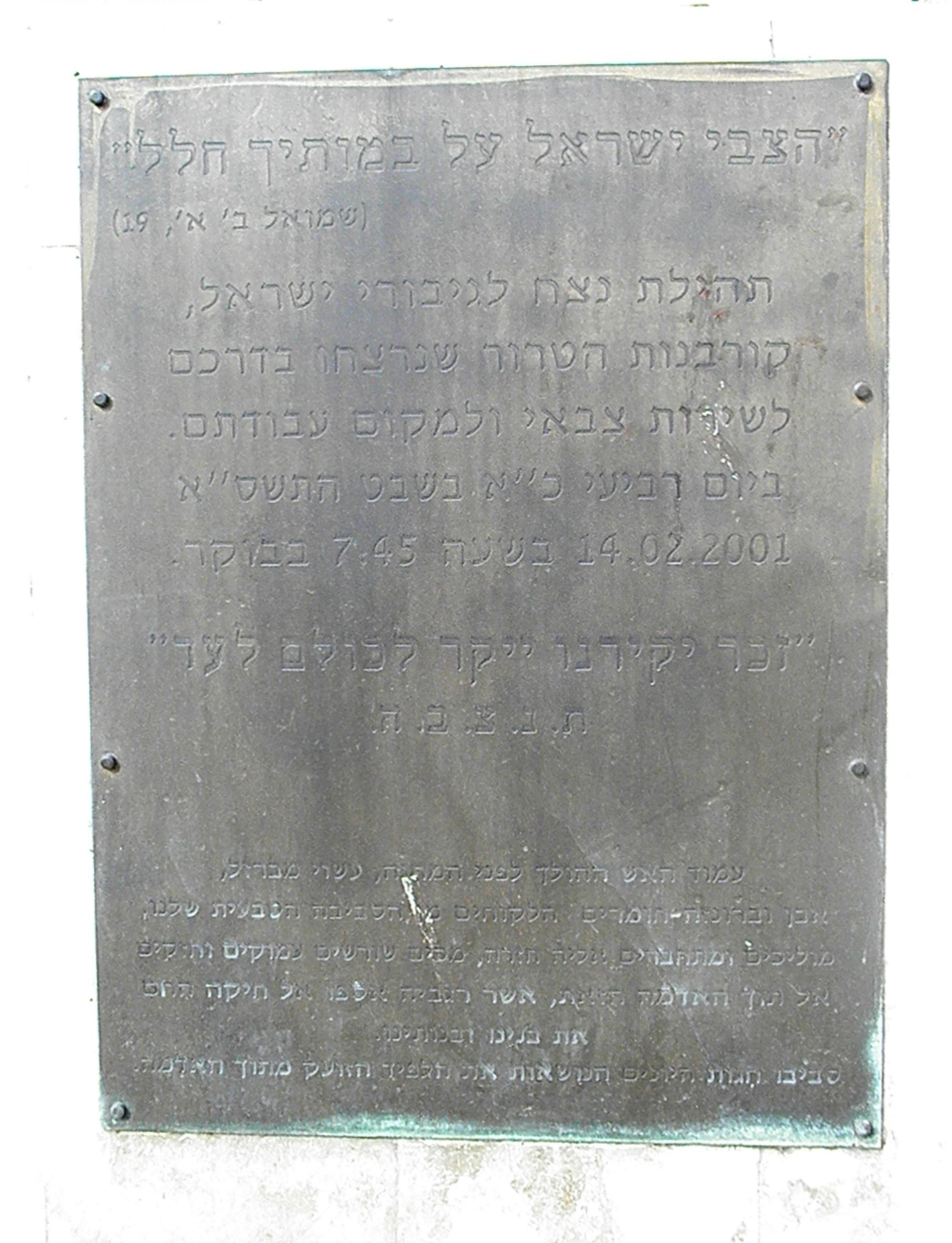 לוח זיכרון לחללי הפיגוע באזור